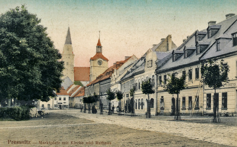 Der Marktplatz der ehemaligen Königlichen Bergstadt Preßnitz im Erzgebirge in Böhmen (alte Postkarte)